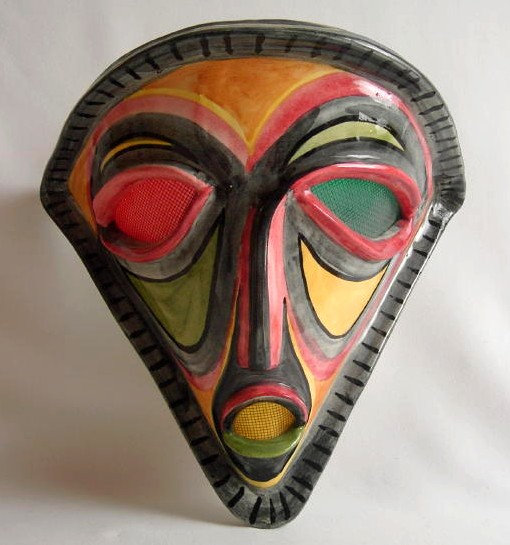 Masque en céramique, Accolay, XXe siècle, France